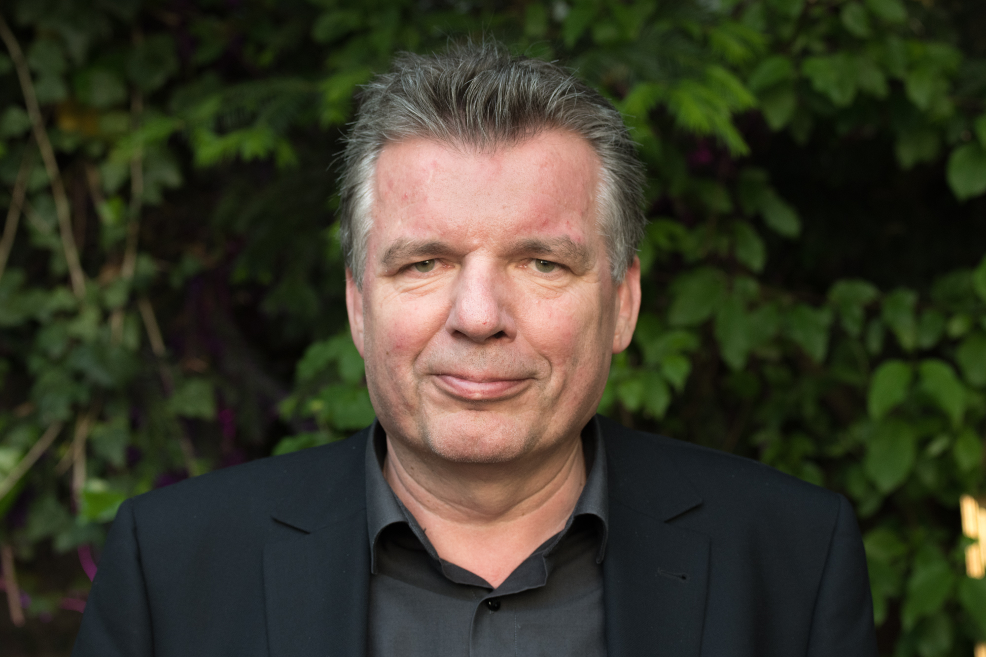 Thomas Baum bei der Eröffnung des Flüchtlingswohnheimes 'Haus der Menschenrechte' von SOS Menschenrechte in Linz